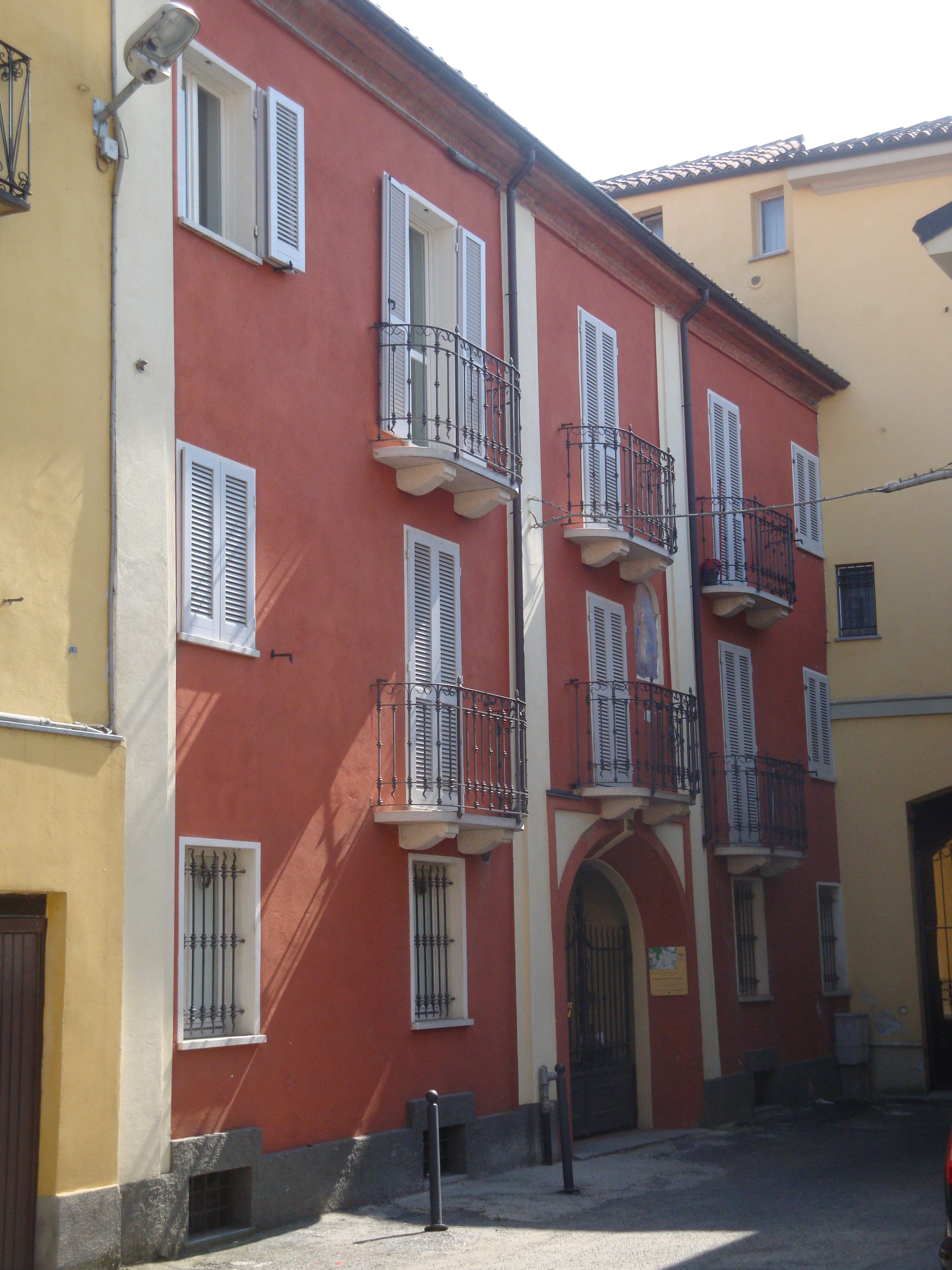 Casa natale di Giovanni Ferrari (1907 – 1982), calciatore e allenatore di calcio italiano.